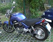 Sachs Roadster 800